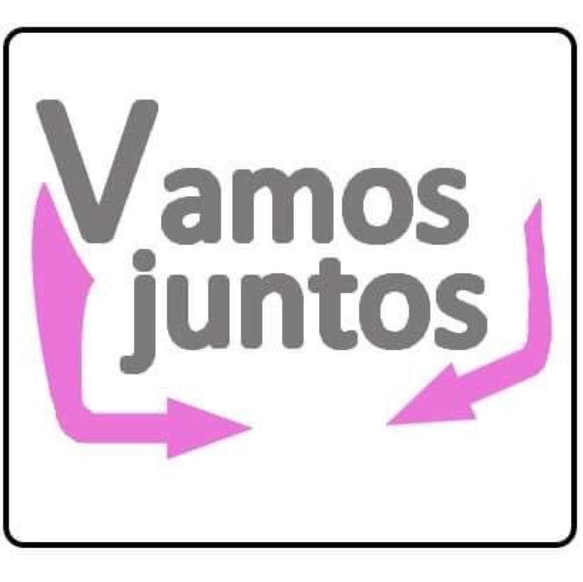 LOGO DE AGRUPACION POLITICA NACIONAL EN MEXICO